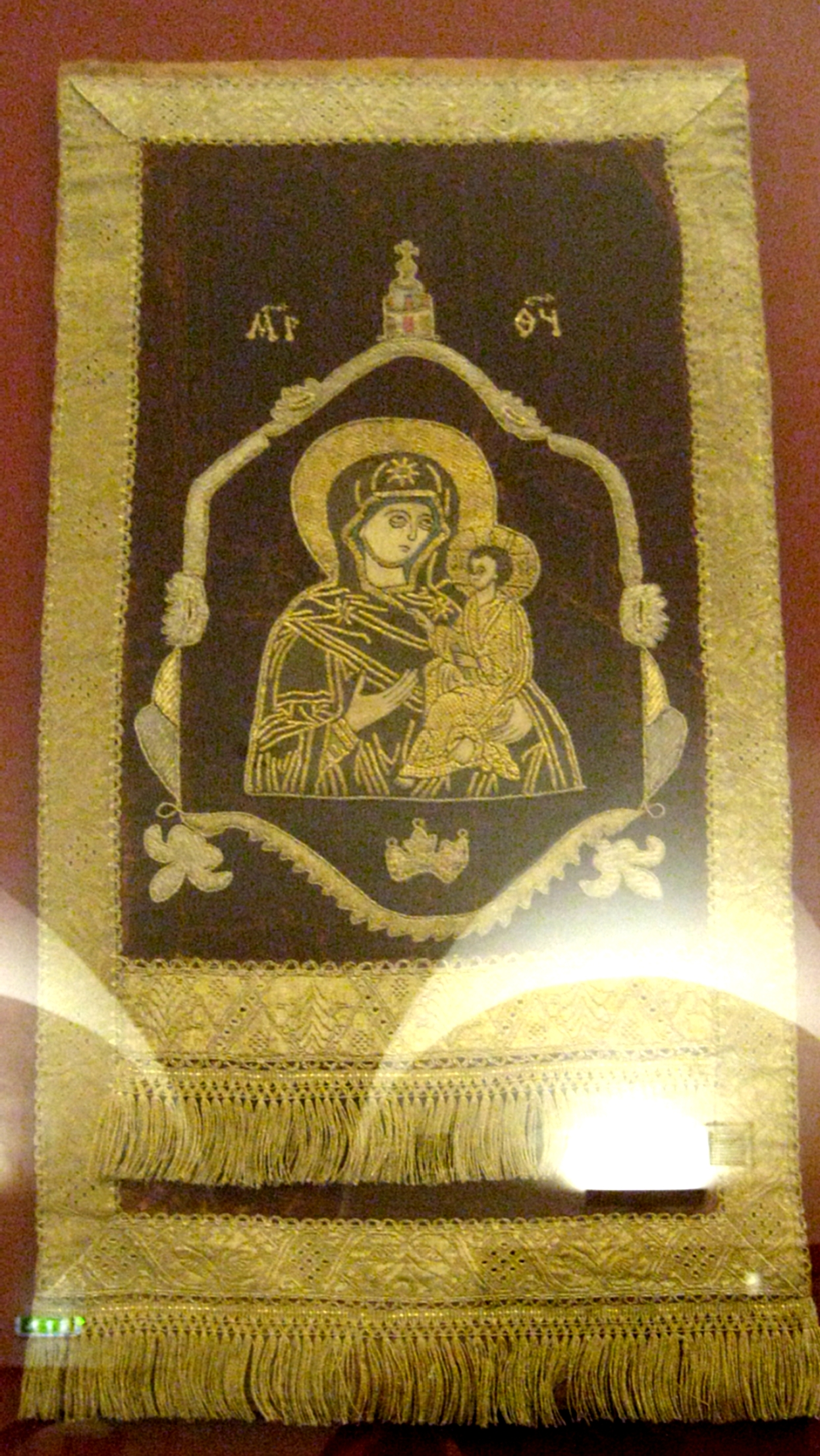 Набедренник "Богоматерь Тихвинская". 2-я пол. 17 века. Москва. Музей Кирилло-Белозерского монастыря